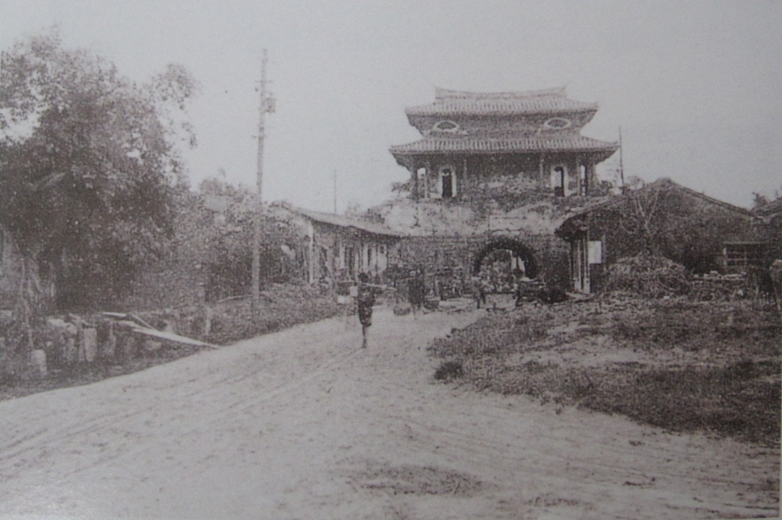 1920年的臺灣府城大東門